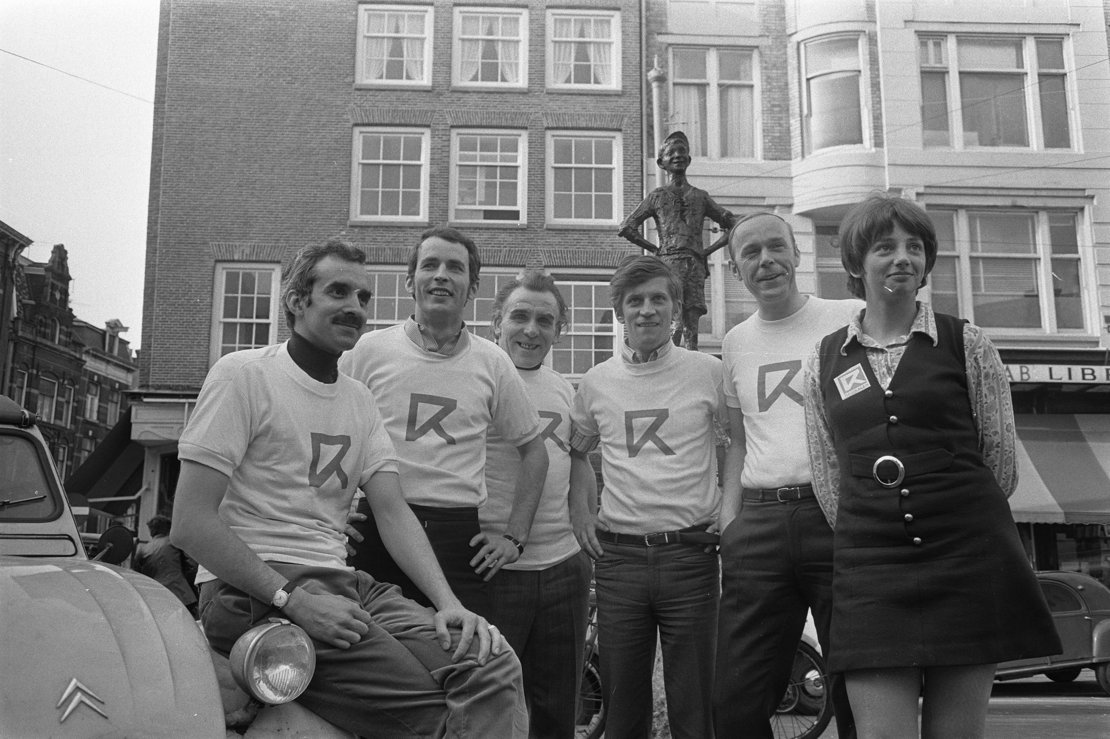 Collectie / Archief : Fotocollectie Anefo Reportage / Serie : PPR-kandidaten voor gemeenteraadverkeizingen in Amsterdamam voor 't Lieverdje op het Spui Beschrijving : V.l.n.r: Erik Jurgens, Henk Branderhorst, Lou Hoefnagels, Bas van Eyndhoven, Jan Rottinghuis en Jellie Alkema Datum : 28 april 1970 Locatie : Amsterdam, Noord-Holland Trefwoorden : gemeenteraden, verkiezingen Persoonsnaam : Alkema, Yellie, Branderhorst, Henk, Eyndhoven, Bas van, Hoefnagels, Lou, Jurgens, Erik, Rottinghuis, Jan Fotograaf : Fotograaf Onbekend / Anefo, [onbekend] Auteursrechthebbende : Nationaal Archief Materiaalsoort : Negatief (zwart/wit) Nummer archiefinventaris : bekijk toegang 2.24.01.05 Bestanddeelnummer : 923-4777